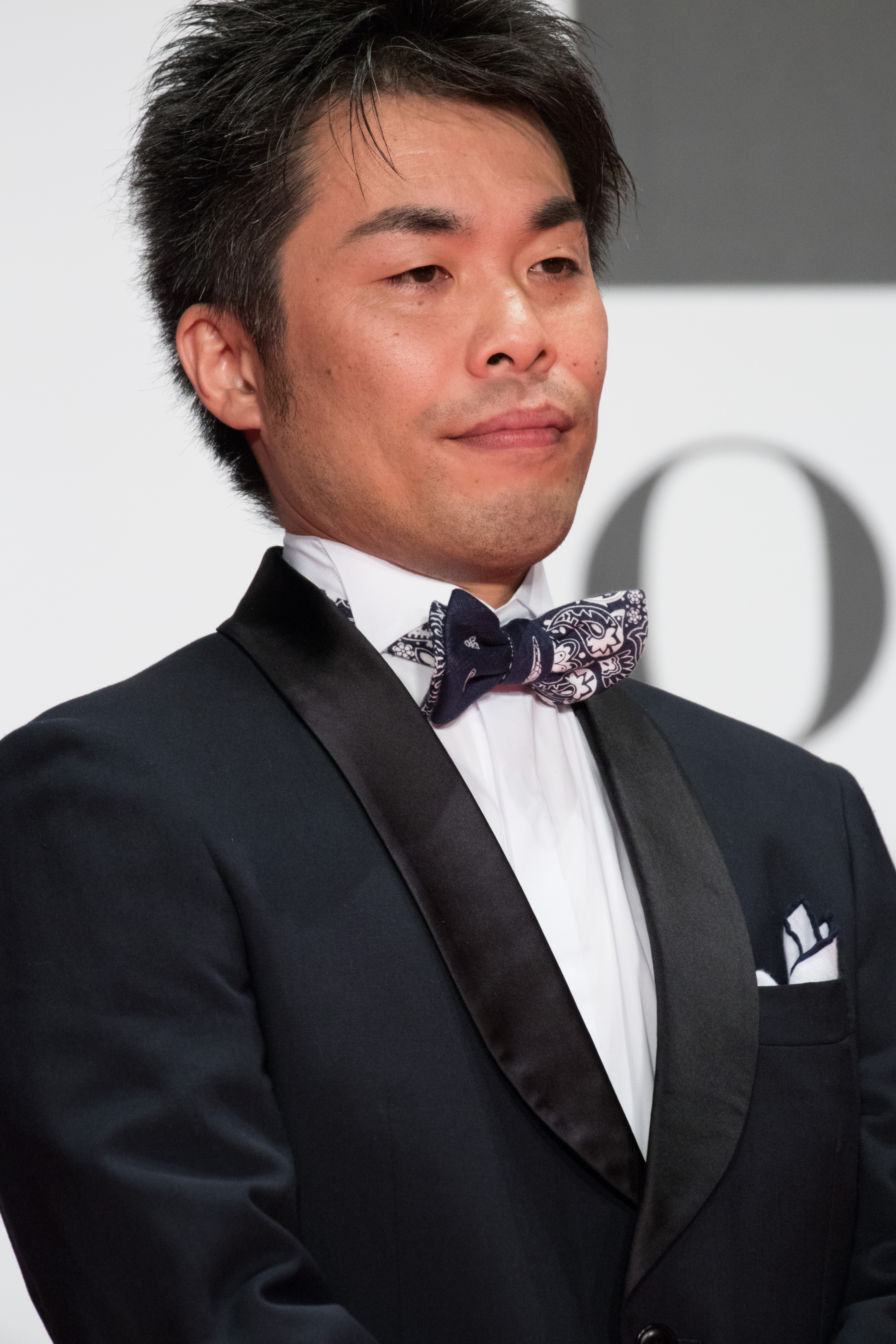 第29回 東京国際映画祭 オープニングセレモニー 森義隆 (聖の青春)